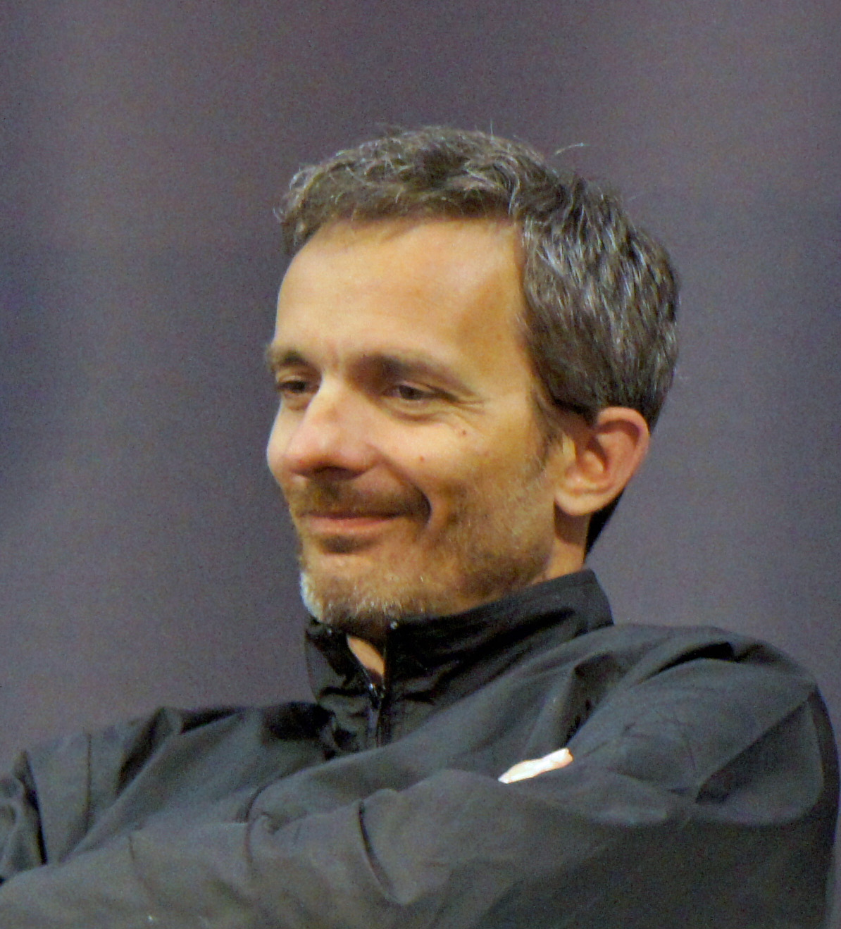 Jérôme Salle au salon du livre 2012.